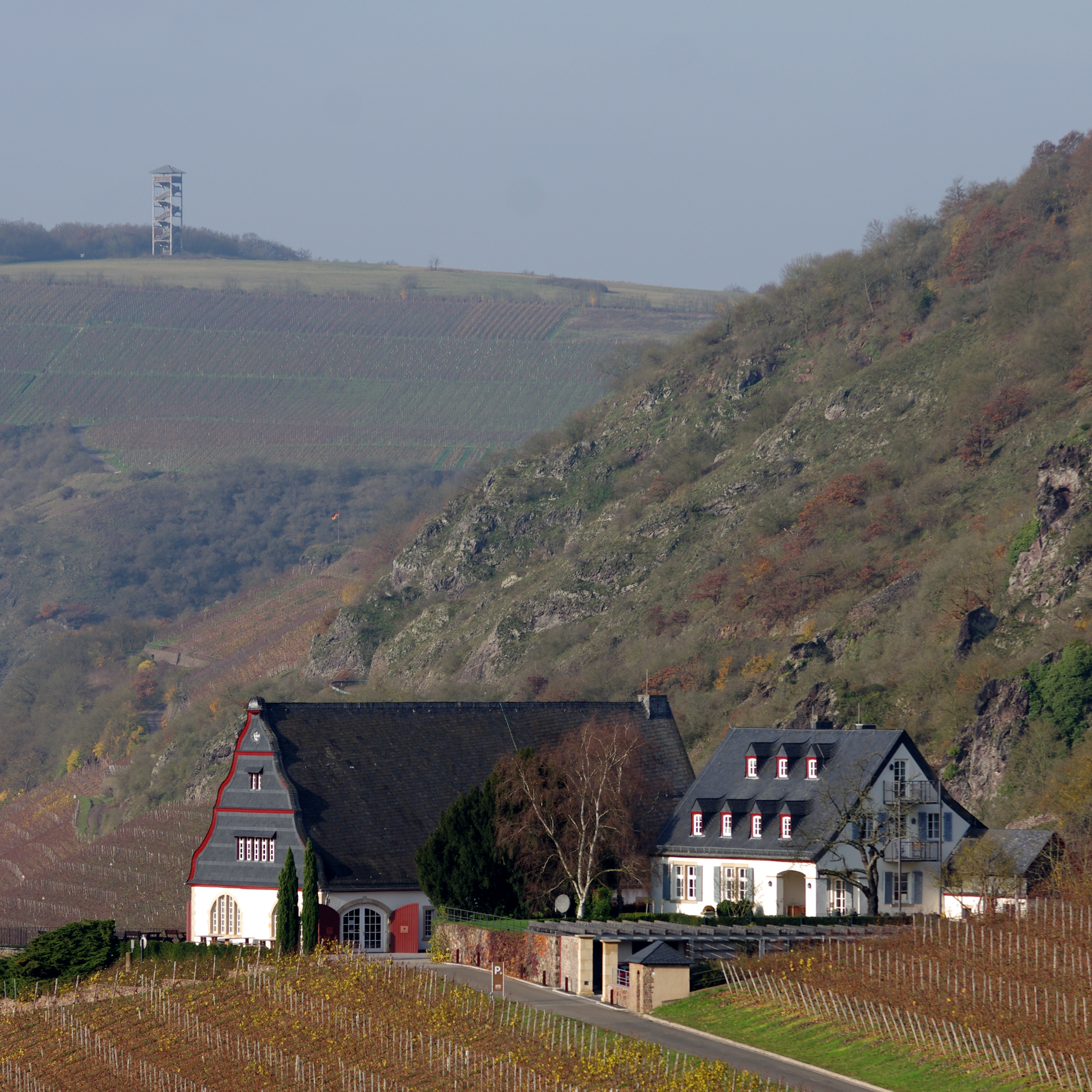 Gut Hermansberg